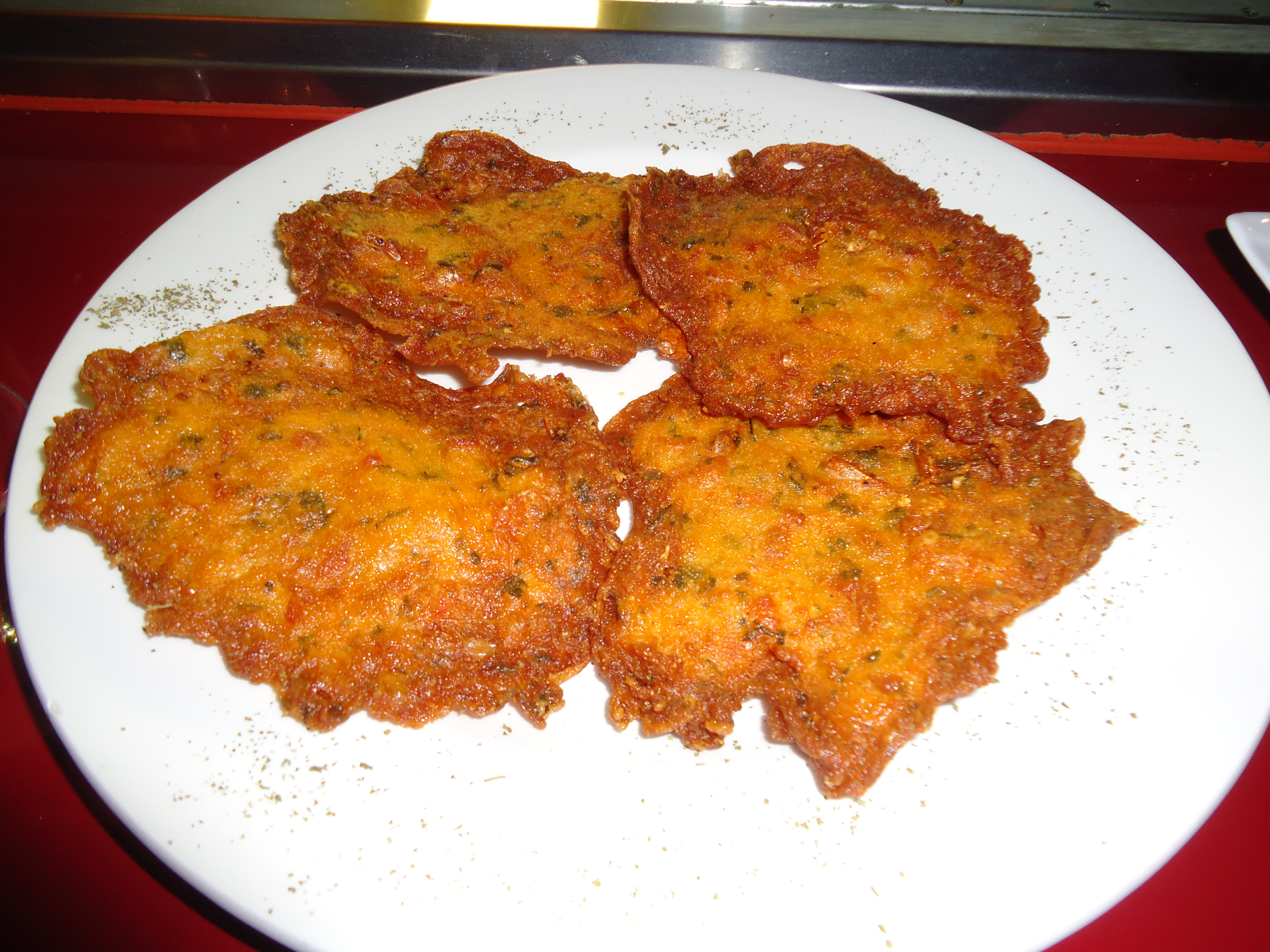 Tortillitas de camarones, en un restaurante de Zaragoza.